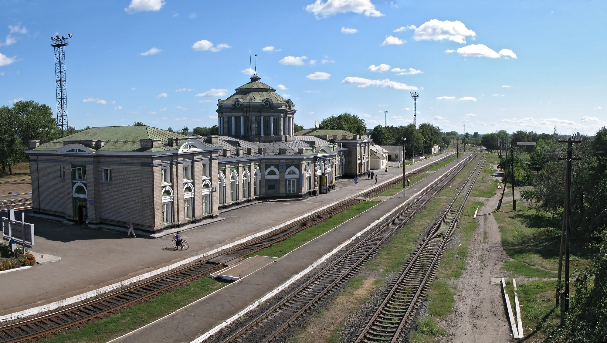 Станція Ворожба